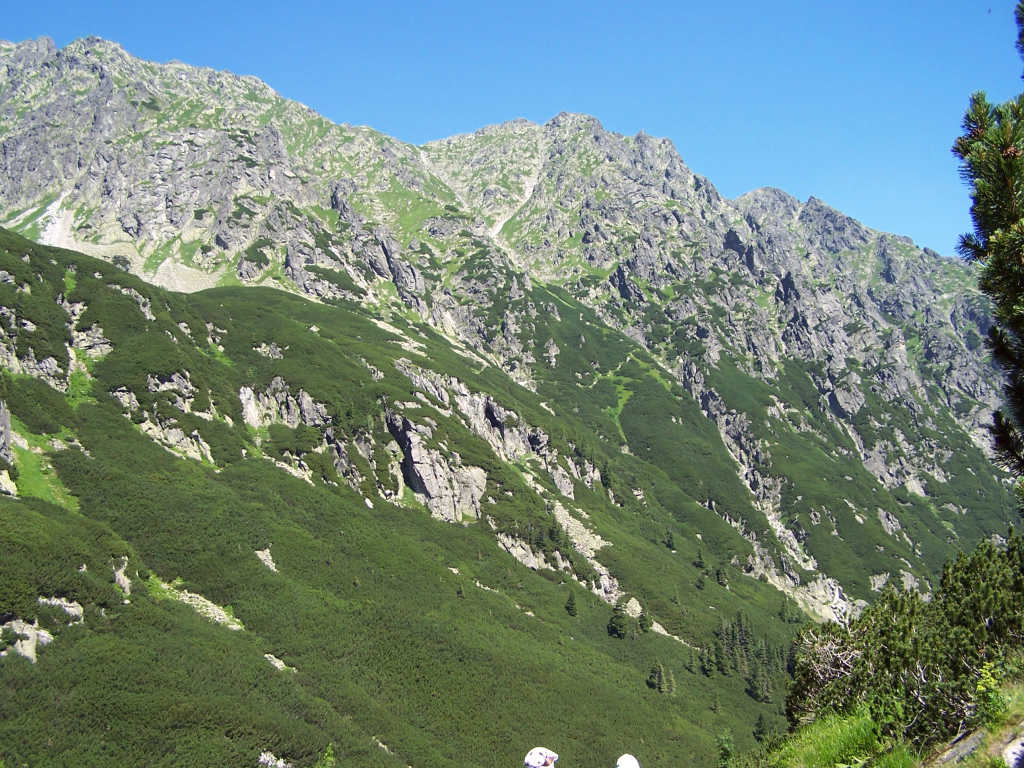 Dolina Roztoki (Tatra Mountains)